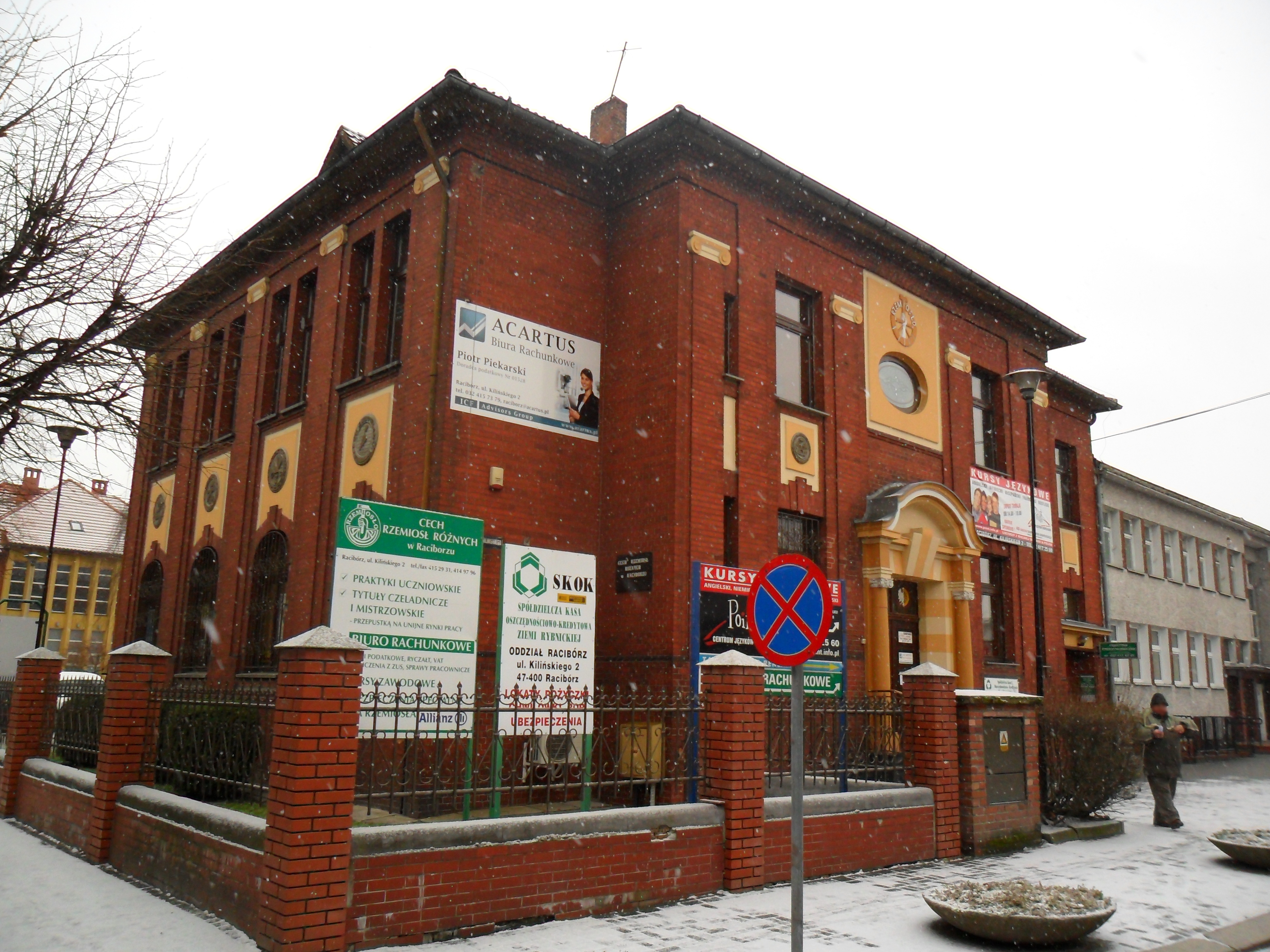 Racibórz, ul. Jana Kilińskiego 2 - dawny dom parafii ewangelickiej, obecnie siedziba Cechu Rzemiosł Różnych